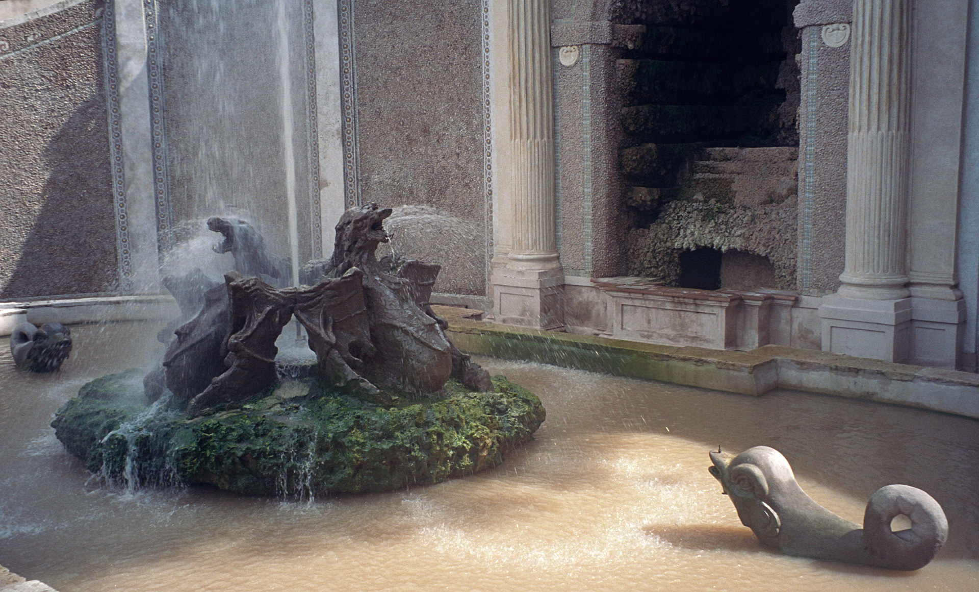 Villa d'Este, Tivoli